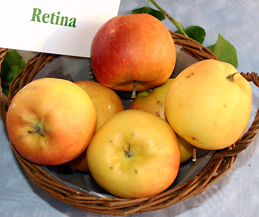 Retina, Büdingen